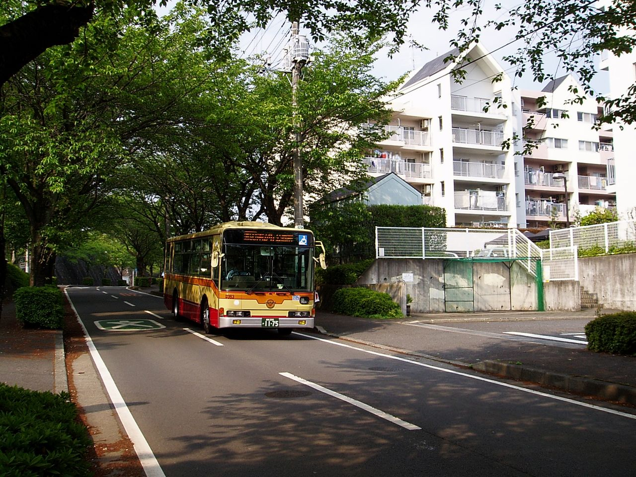 Kanagawa Chuo Kotsu Ha063（は063） Mitsubishi KL-MP35JM at Minamigaoka(Hadano City)